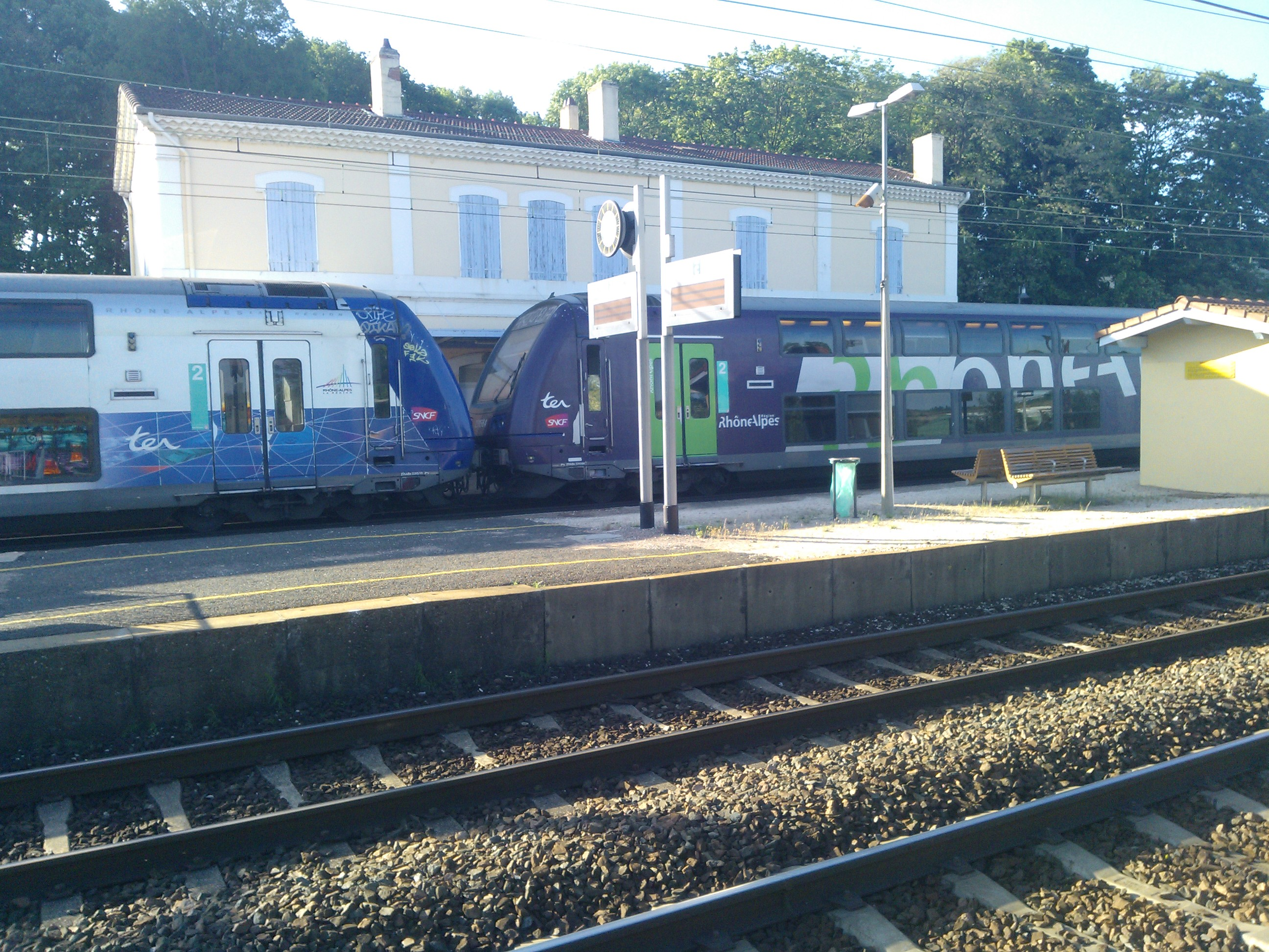 Train de 8:10 à Sérézin